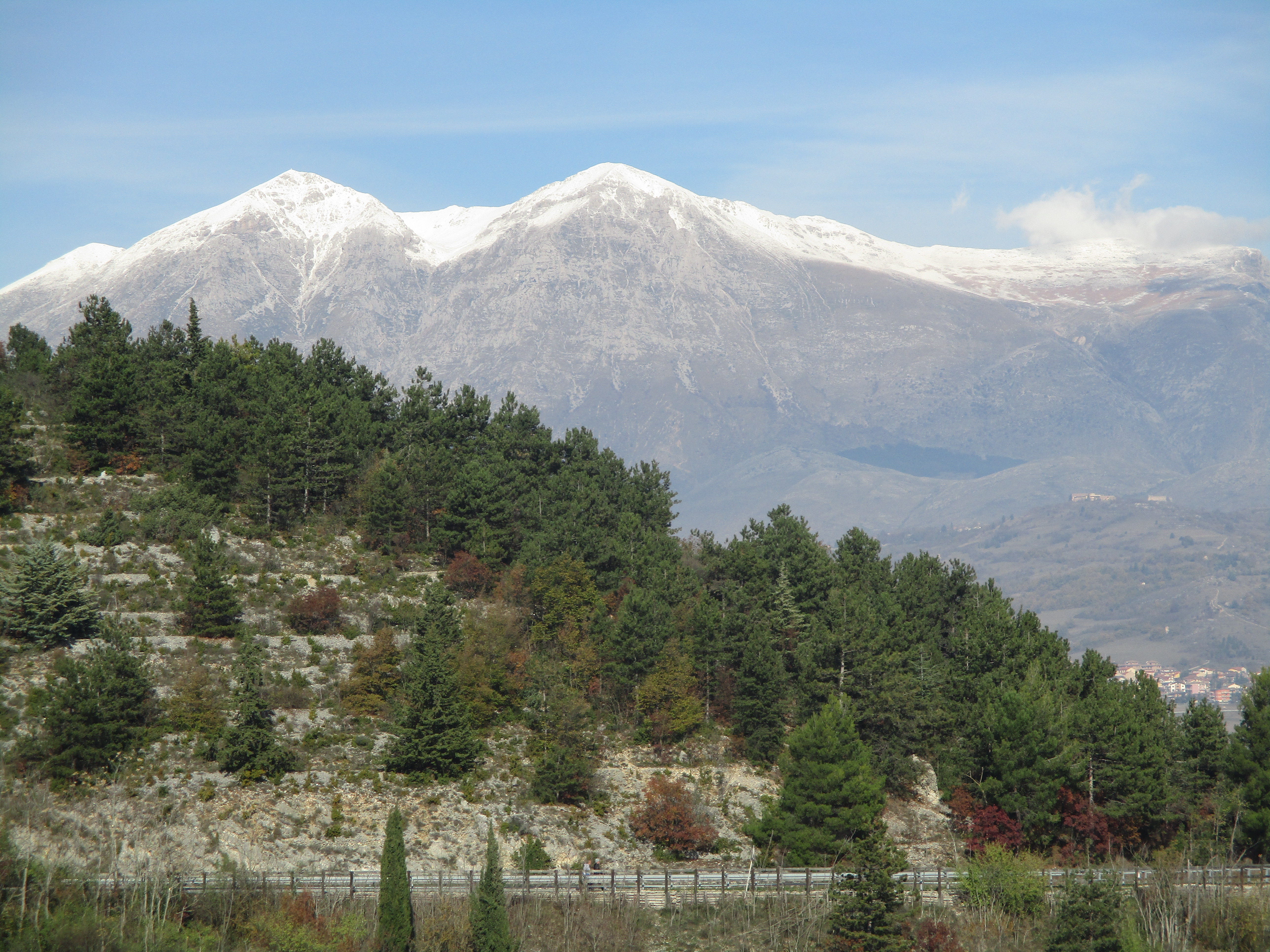 Monte Velino visto dalla riserva naturale del monte Salviano